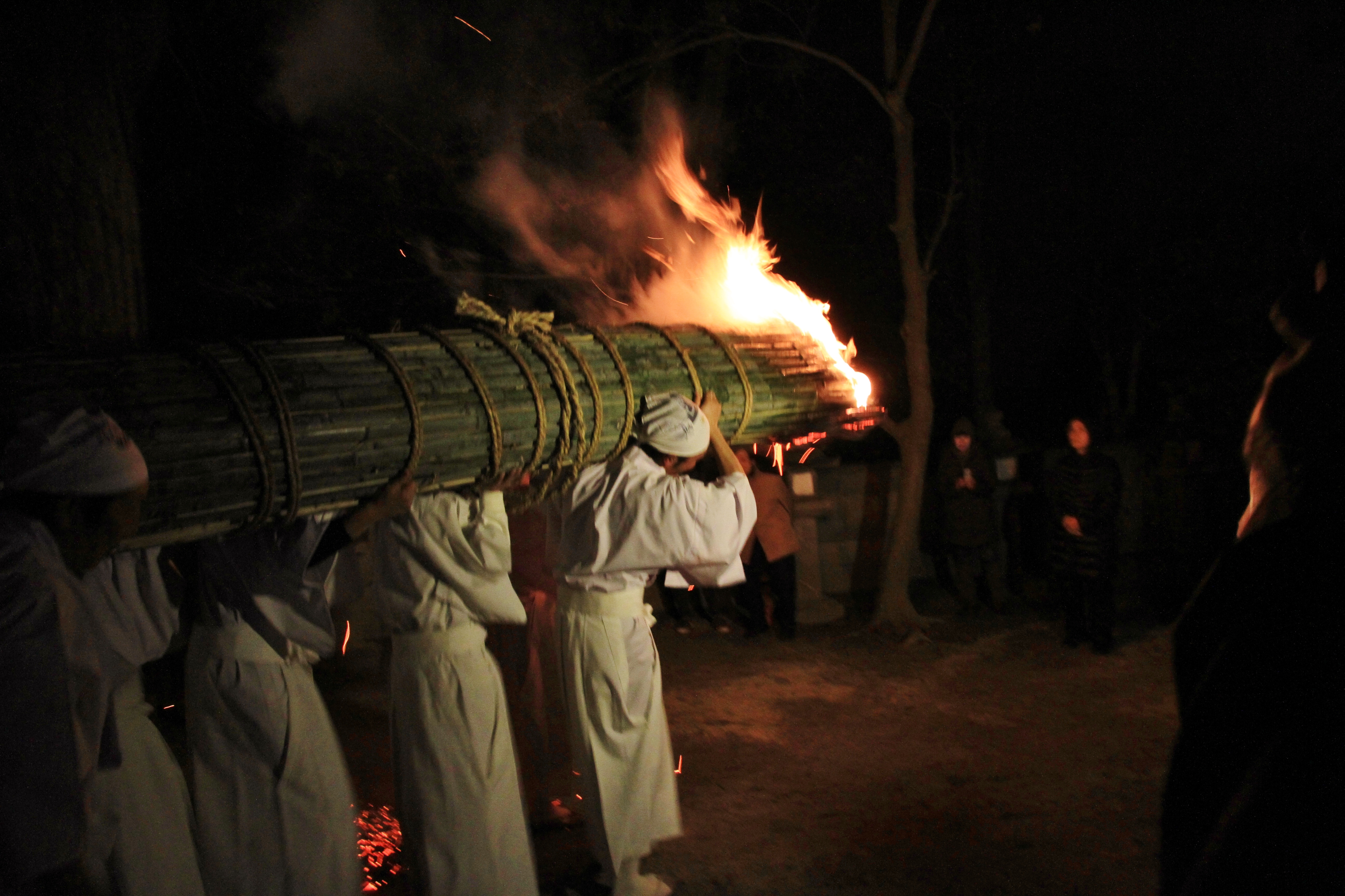 いごもり祭 大松明巡行